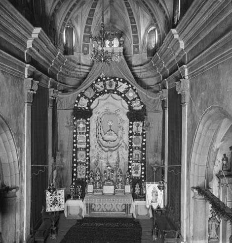 Imatge